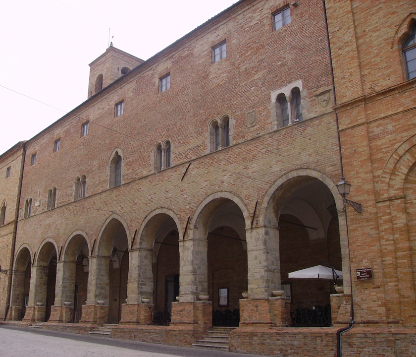 Ripatronsone (Ascoli Piceno):Palazzo del Podestà